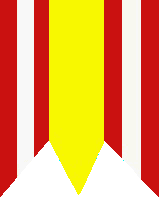 Vlajka obce Veľké Úľany